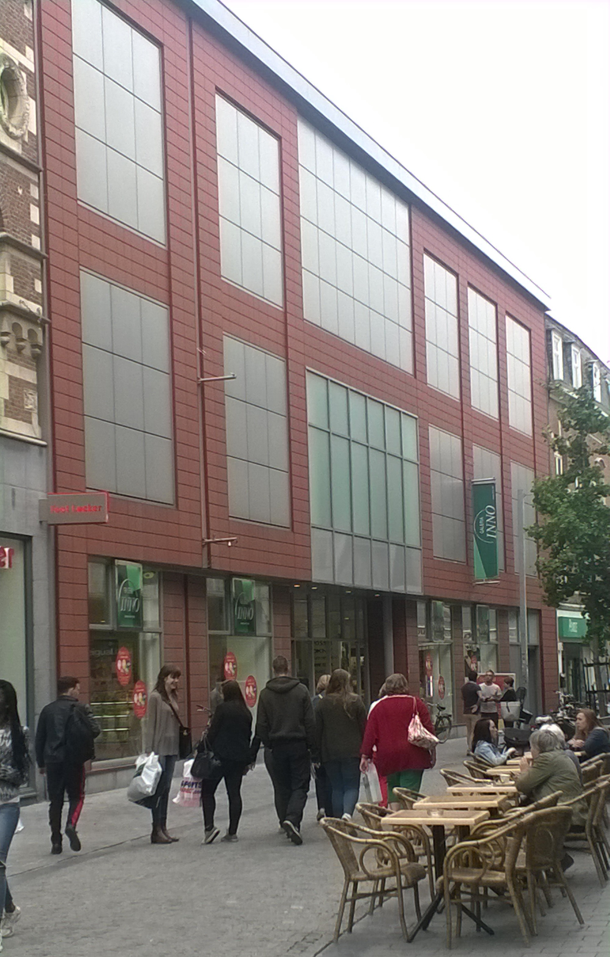 Galeria Inno Leuven Diestsestraat